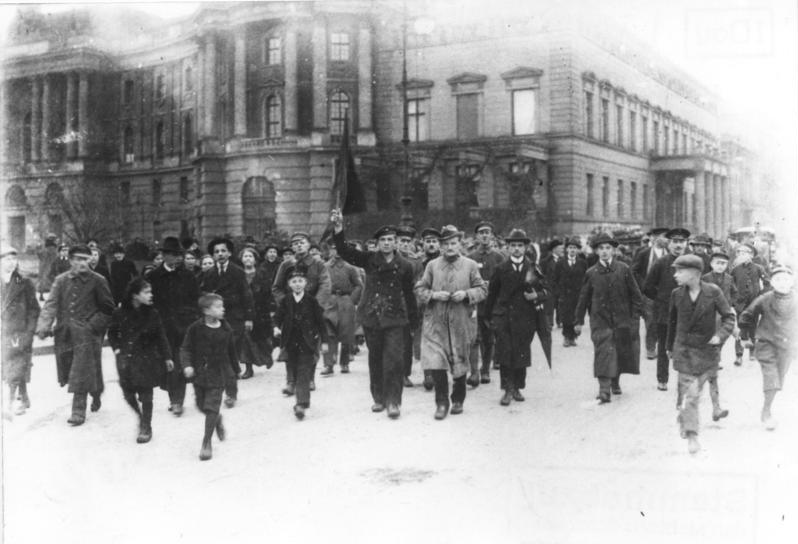 ADN-ZB/Archiv Novemberrevolution 1918 in Deutschland. In Berlin beginnt am Morgen des 9. November 1918 der Generalstreik und der bewaffnete Kampf. Die Soldaten verbüdern sich mit dem revolutionären Proletariat. Die Monarchie und die kaiserliche Regierung wird gestürzt. Demonstrationen am 9.11. in Berlin, Unter den Linden, in Höhe der Universität, (Unter den begleitenden Kindern befindet sich Arno Munter, dritter Junge von links).